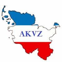 Vereinswappen